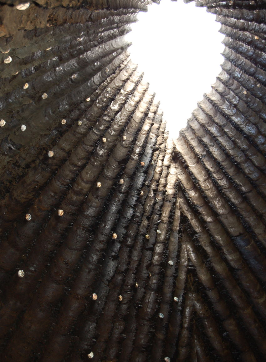 Das Himmelsloch der Feldkapelle in Wachendorf/Eifel